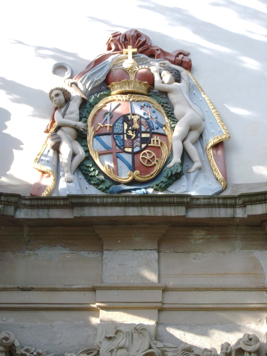 Fürstin-Franziska-Christine-Stiftung Wappen über dem Eingang der Kirchen Aufgenommen von Schumir am 26. Mai 2005 GNU FDL